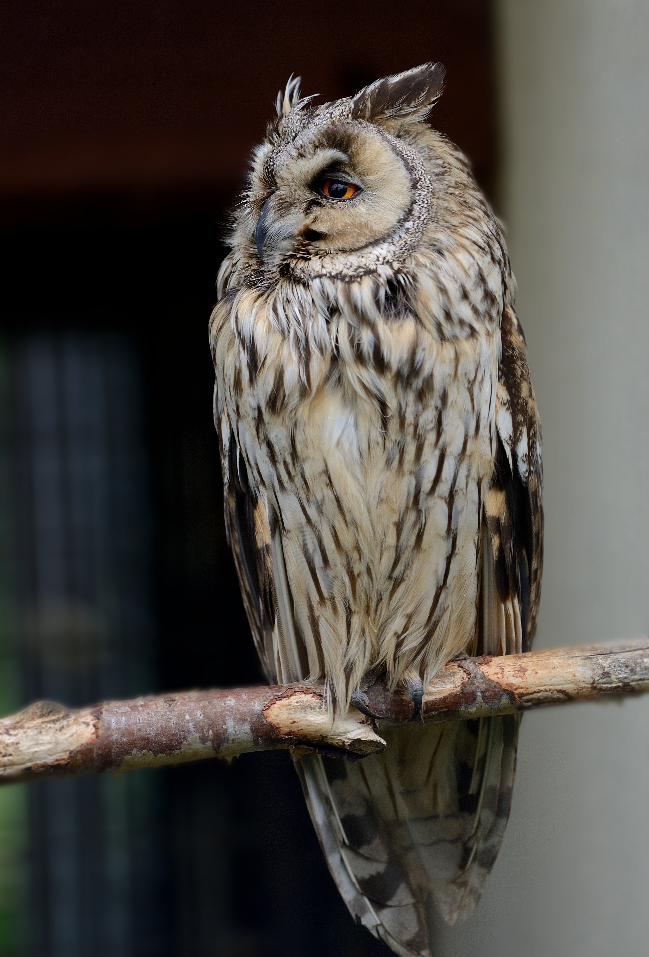 Сова. Парк птиц Воробьи